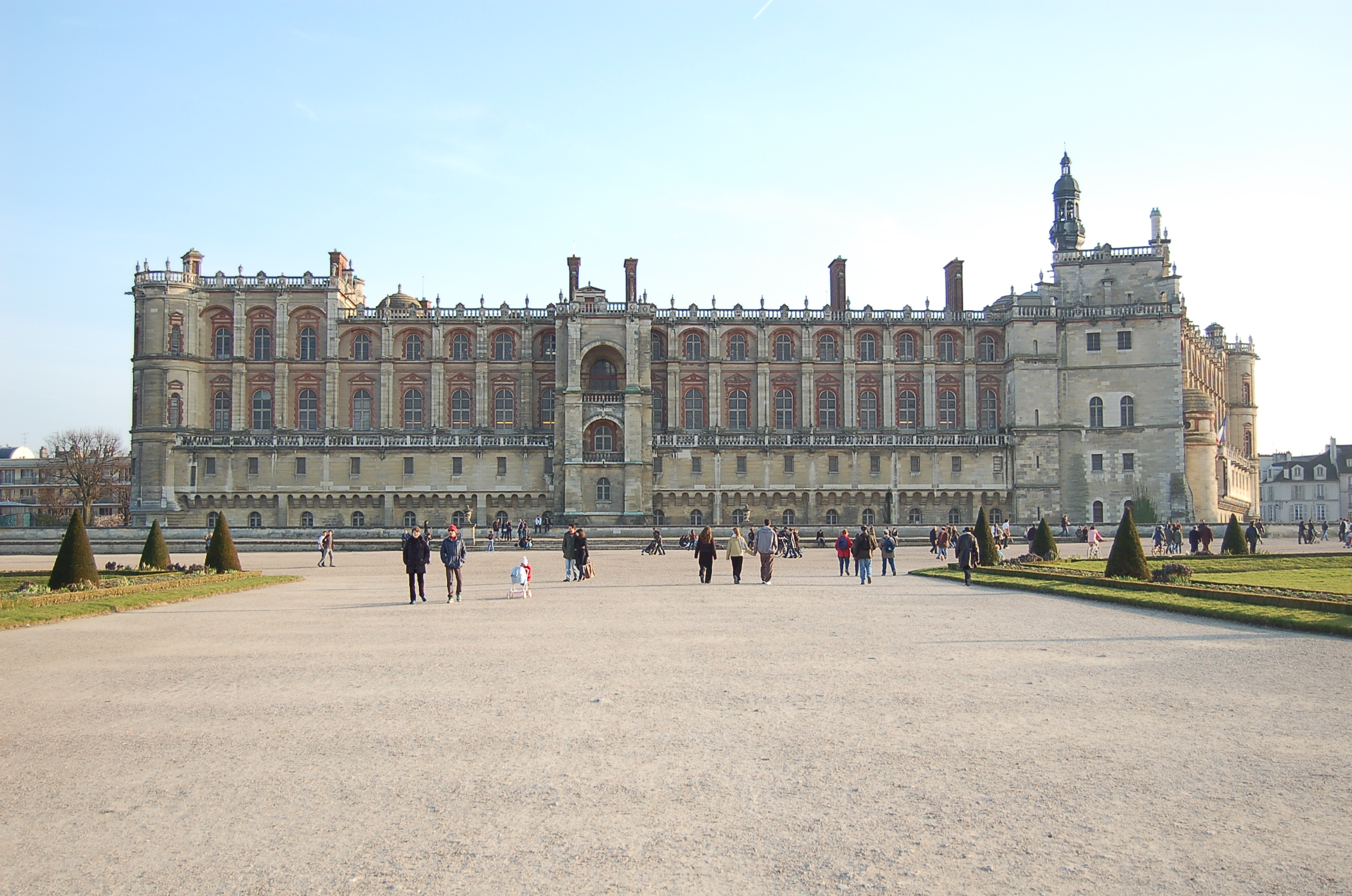 Château de Saint-Germain-en-Laye